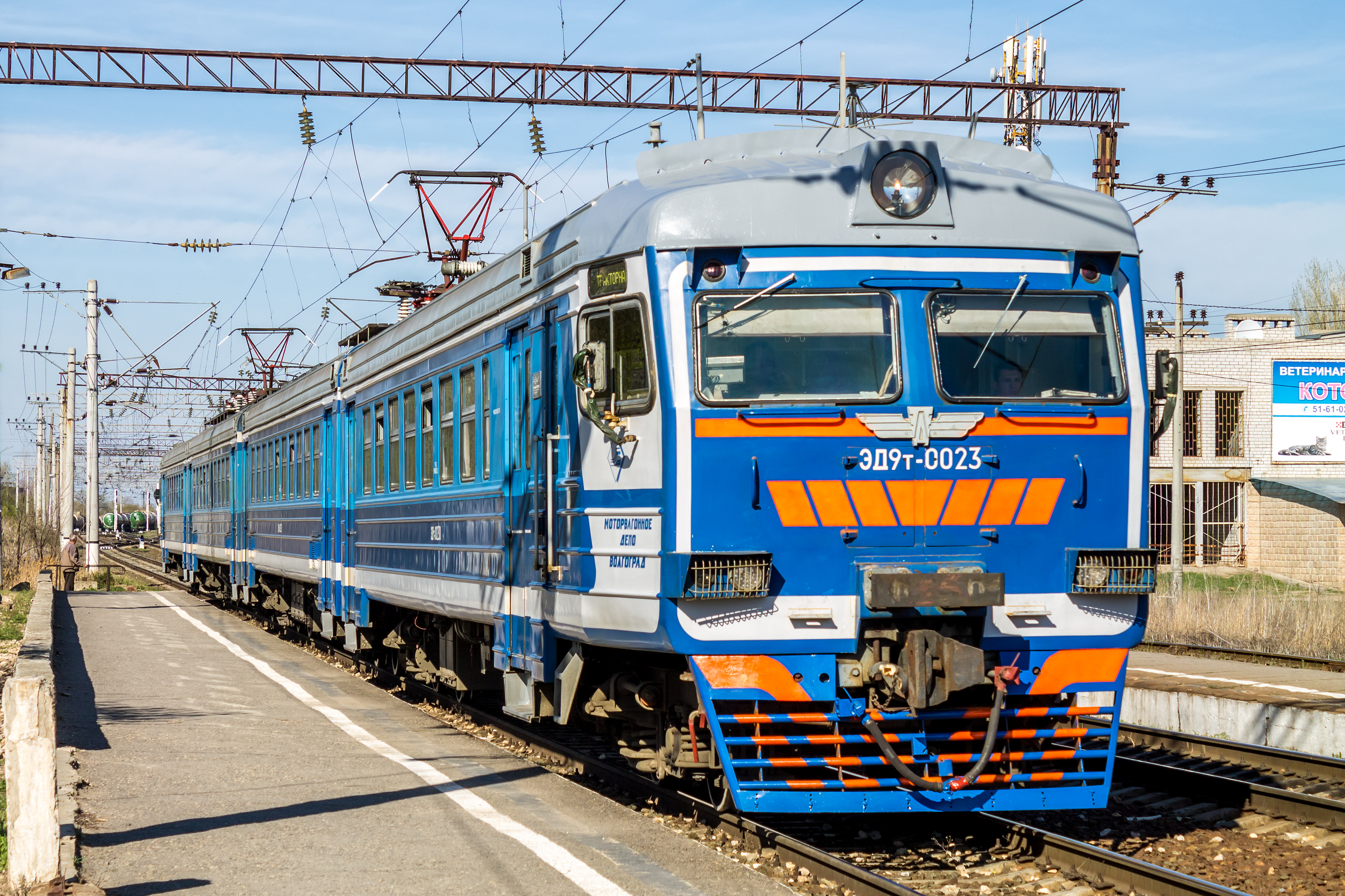 ЭД9Т-0023, о.п. Заканальная см. фото 693150 в альбоме автора